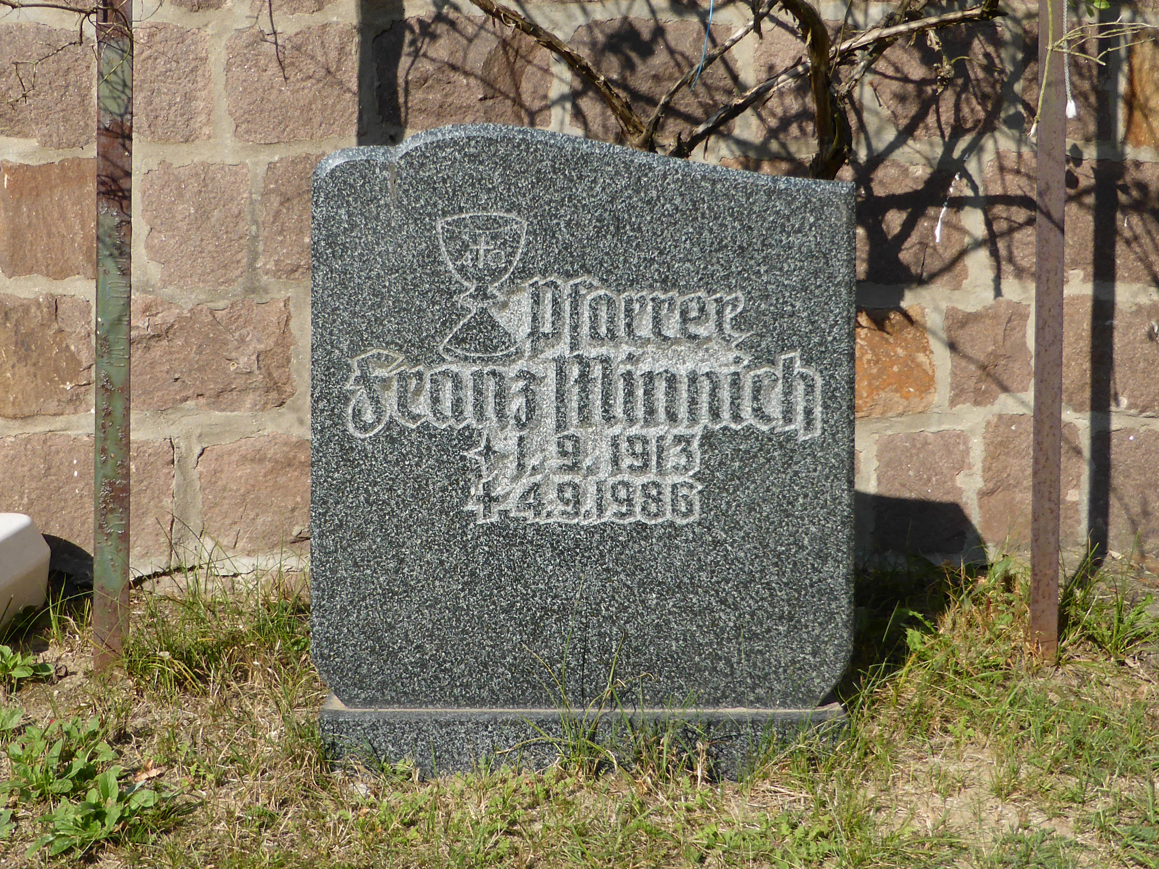 Grabstein von Pfarrer Franz Minnich in Steckelsdorf, Erbauer der St.-Josef-Kirche in Steckelsdorf.